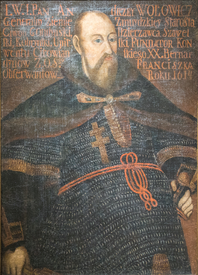 Беларуская (тарашкевіца): Партрэт Андрэя Валовіча (Andrej Vałovič)